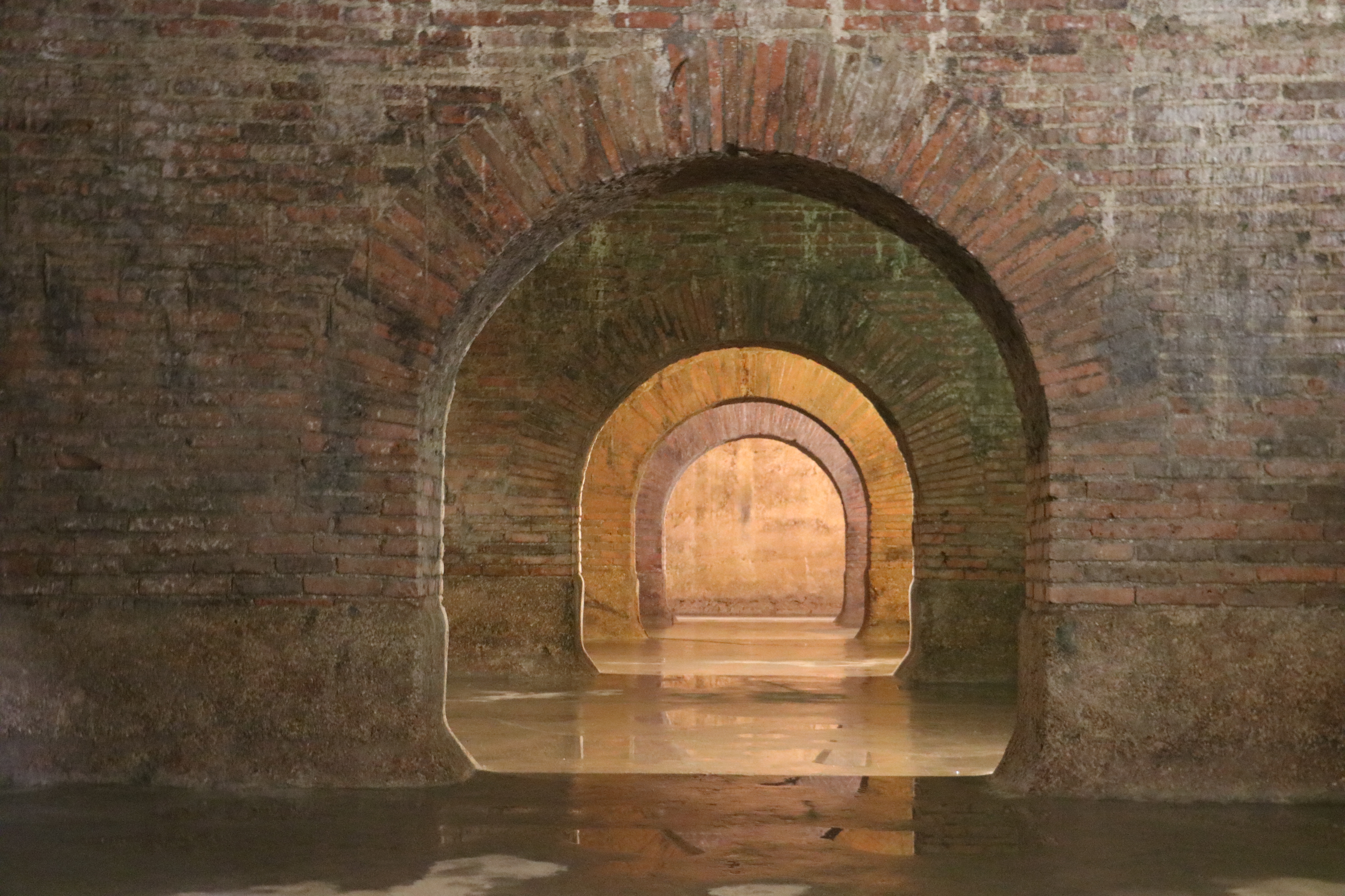 Cisterne Romane This is a photo of a monument which is part of cultural heritage of Italy.